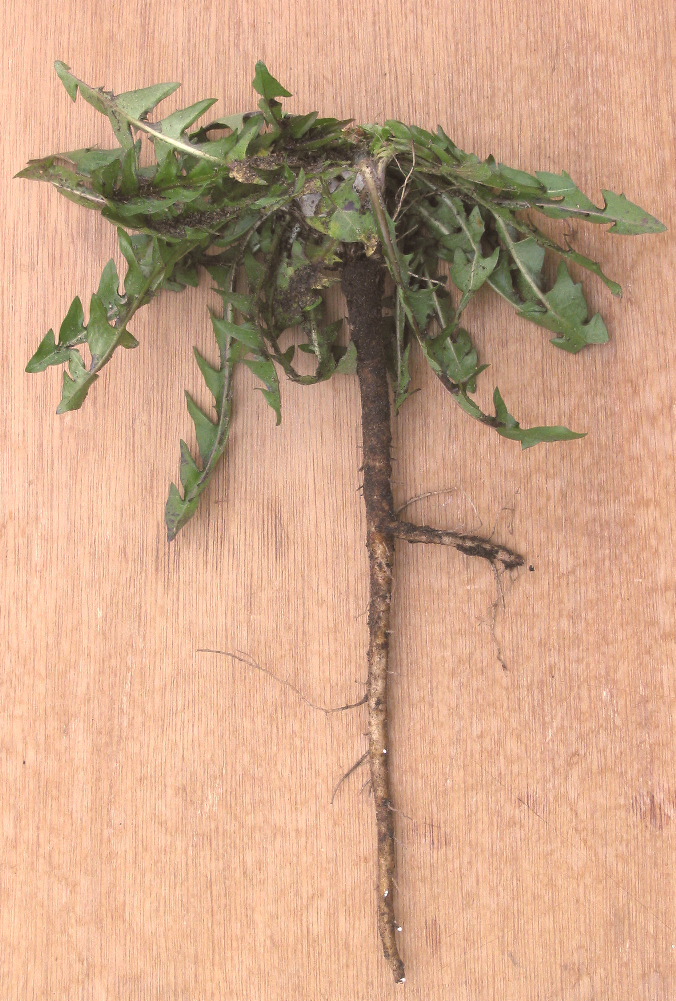 Bladrozet en penwortel van Taraxacum officinale (Pardenbloem)